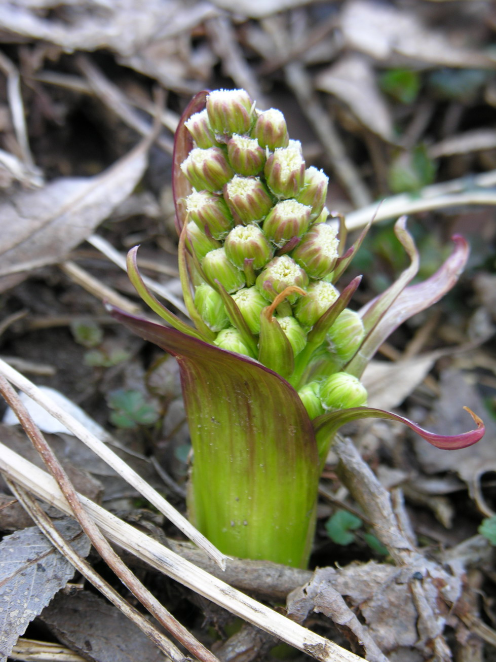 Petasites spurius Fam. Asteraceae